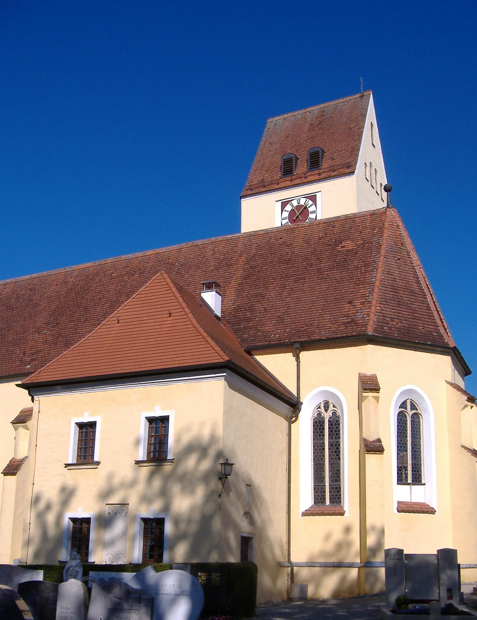 Bertholdsheim